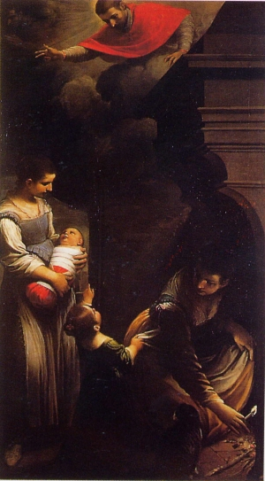 Miracolo di San Carlo Borromeo, o/t, cm. 217 x 117, Renazzo di Cento, chiesa di San Sebastiano